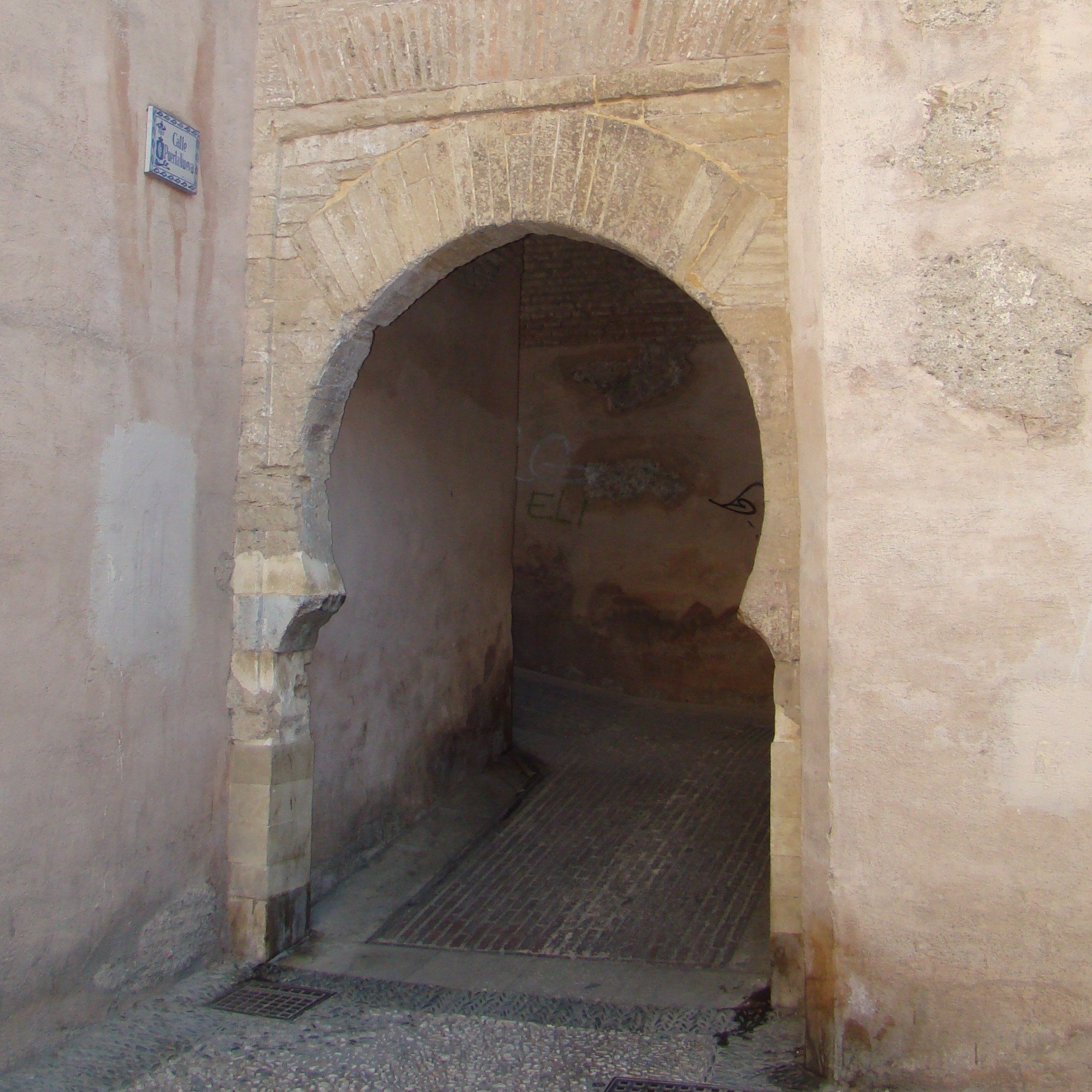 Arco de las Pesas, en el Albaicín (Granada)